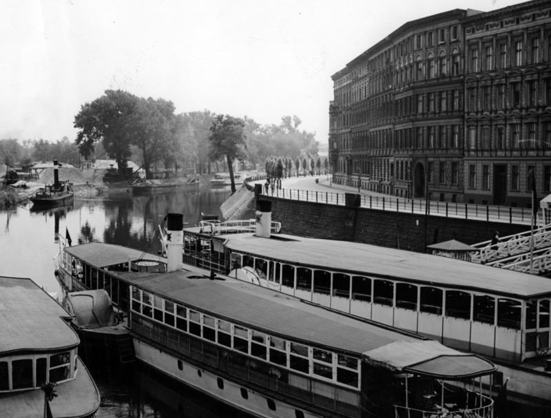 Blick von der Kaiserbrücke auf den Wohnblock. Aufn: Kühnel